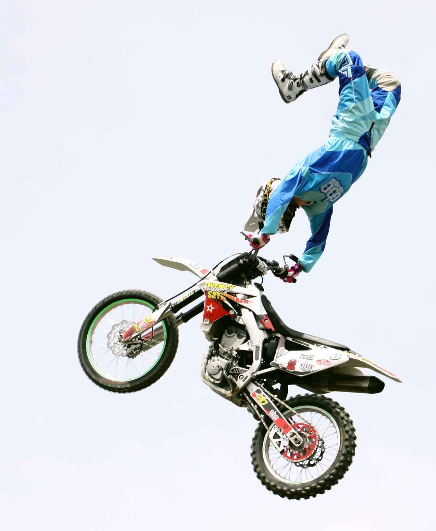 ADAC MX Masters in Freising.